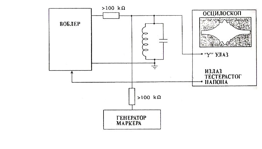 cetvrta slika